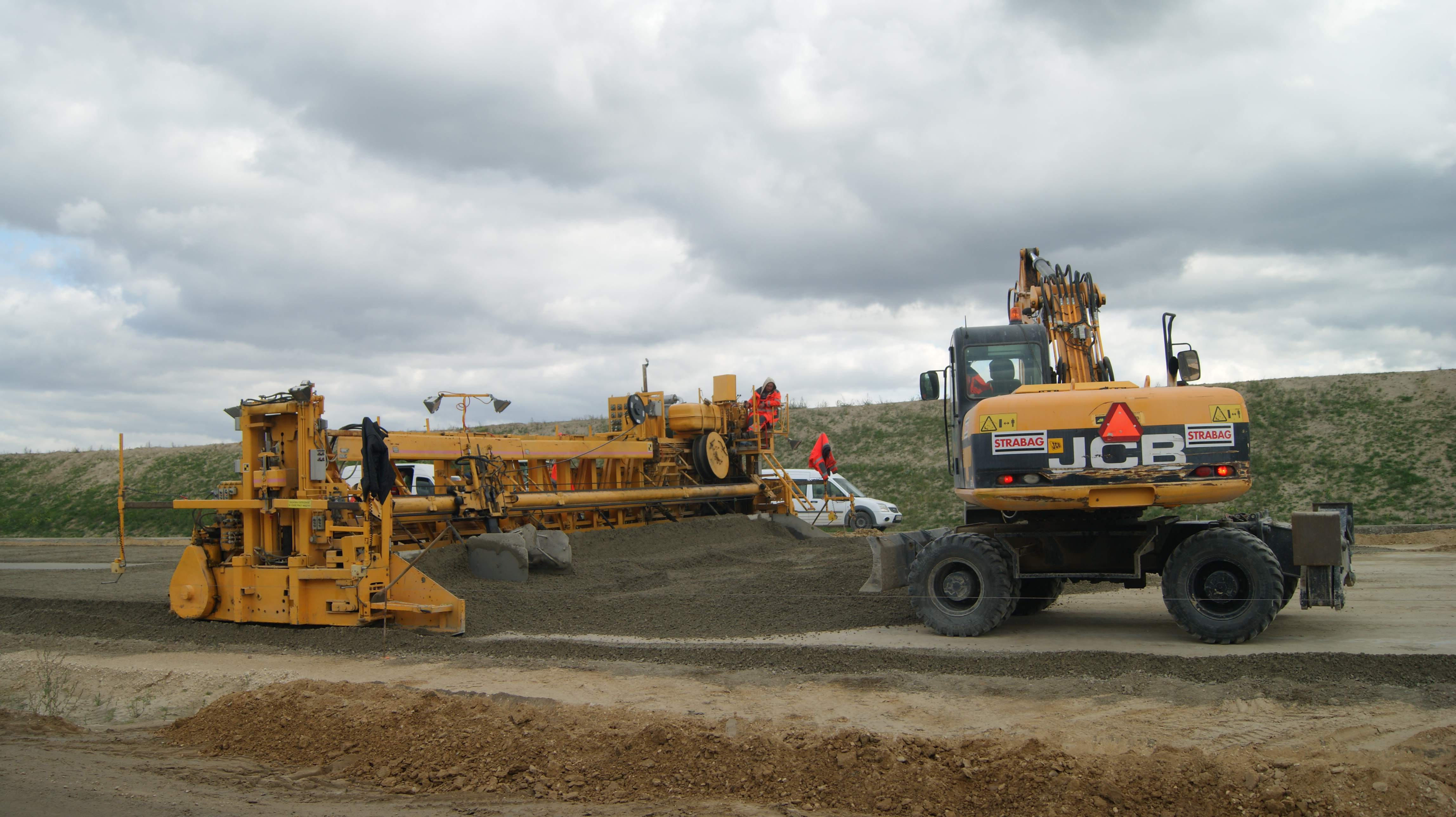 Maszynowe układanie betonu chudego na budowanej autostradzie A1 Łódź w miejscowości Wiączyń.